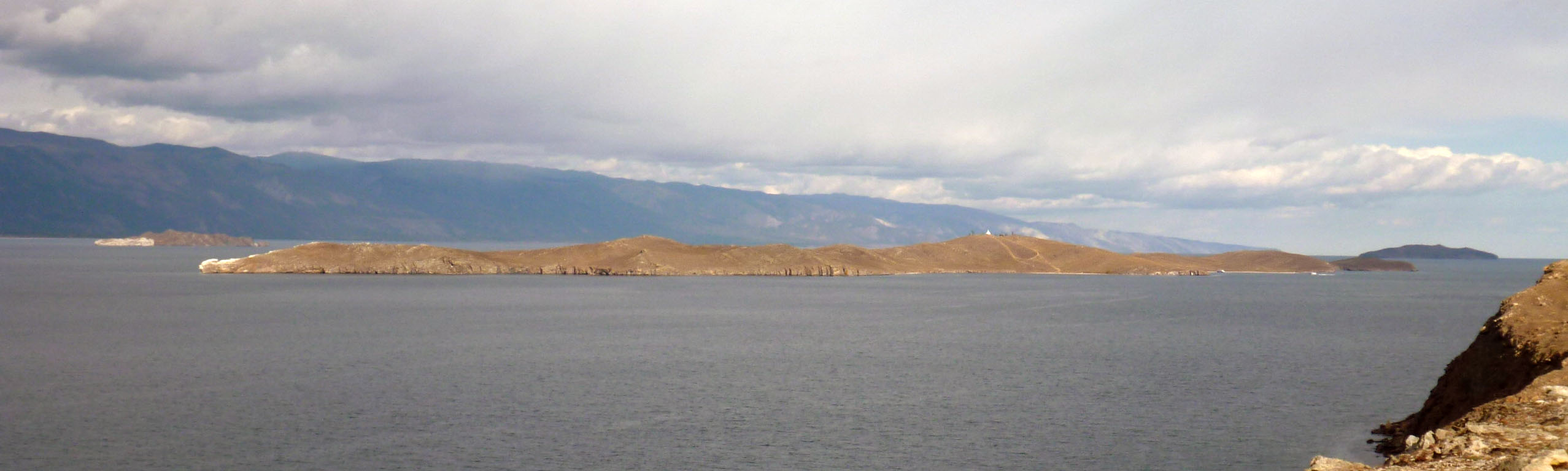 Вид на остров Огой с мыса Харгой (о. Ольхон)